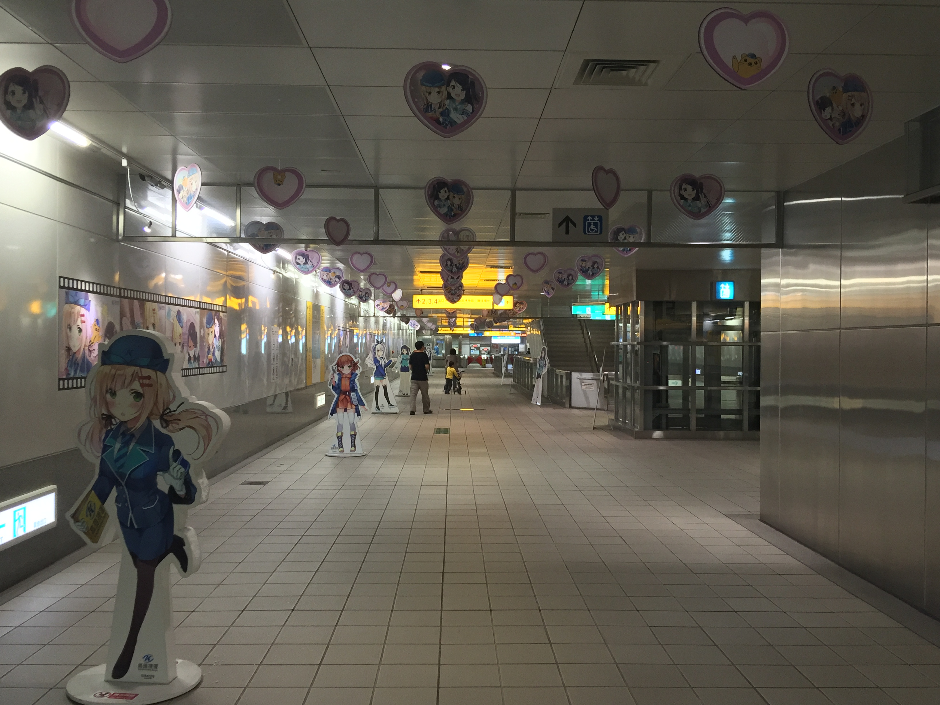 高雄捷運鹽埕埔站大廳常設的高捷少女裝飾。